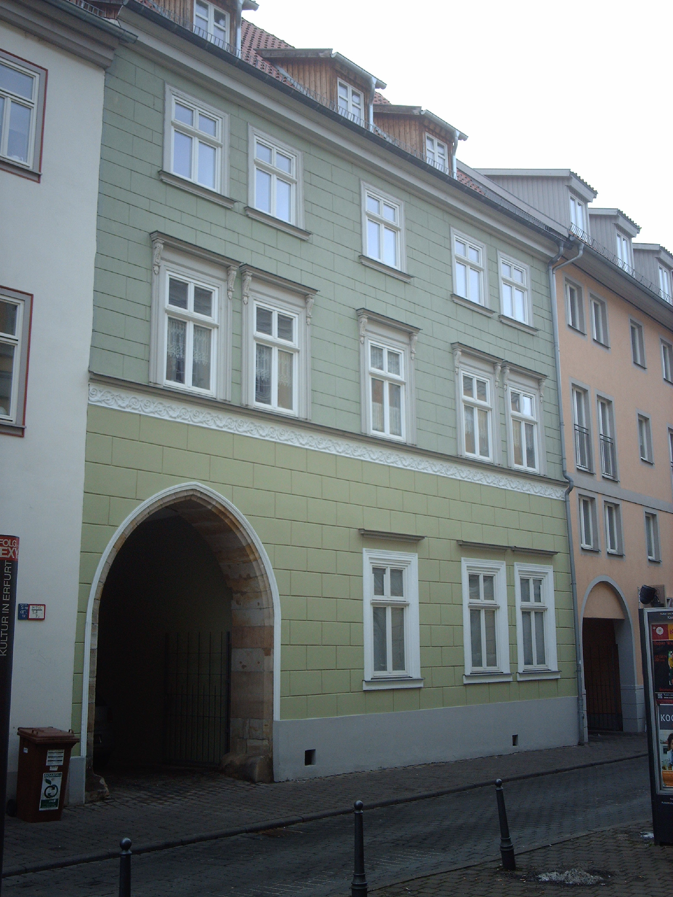 Haus Zum Goldenen Faß in Erfurt, Futterstraße 5.